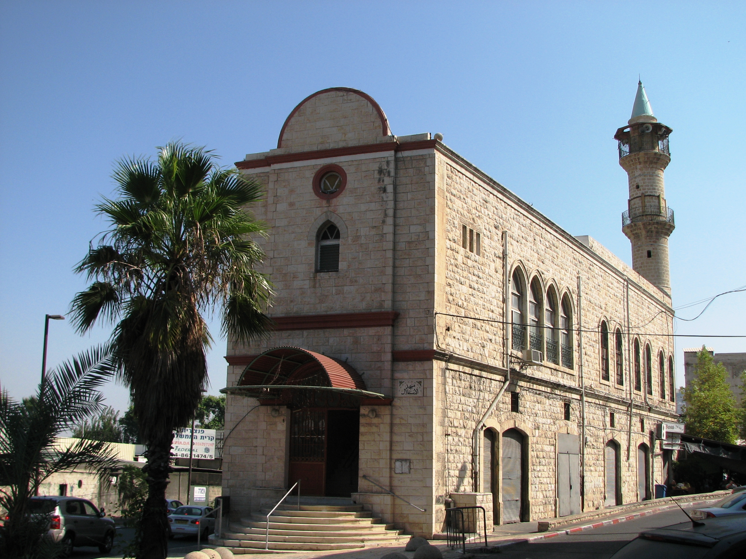 מסגד איסתקלאל בחיפה